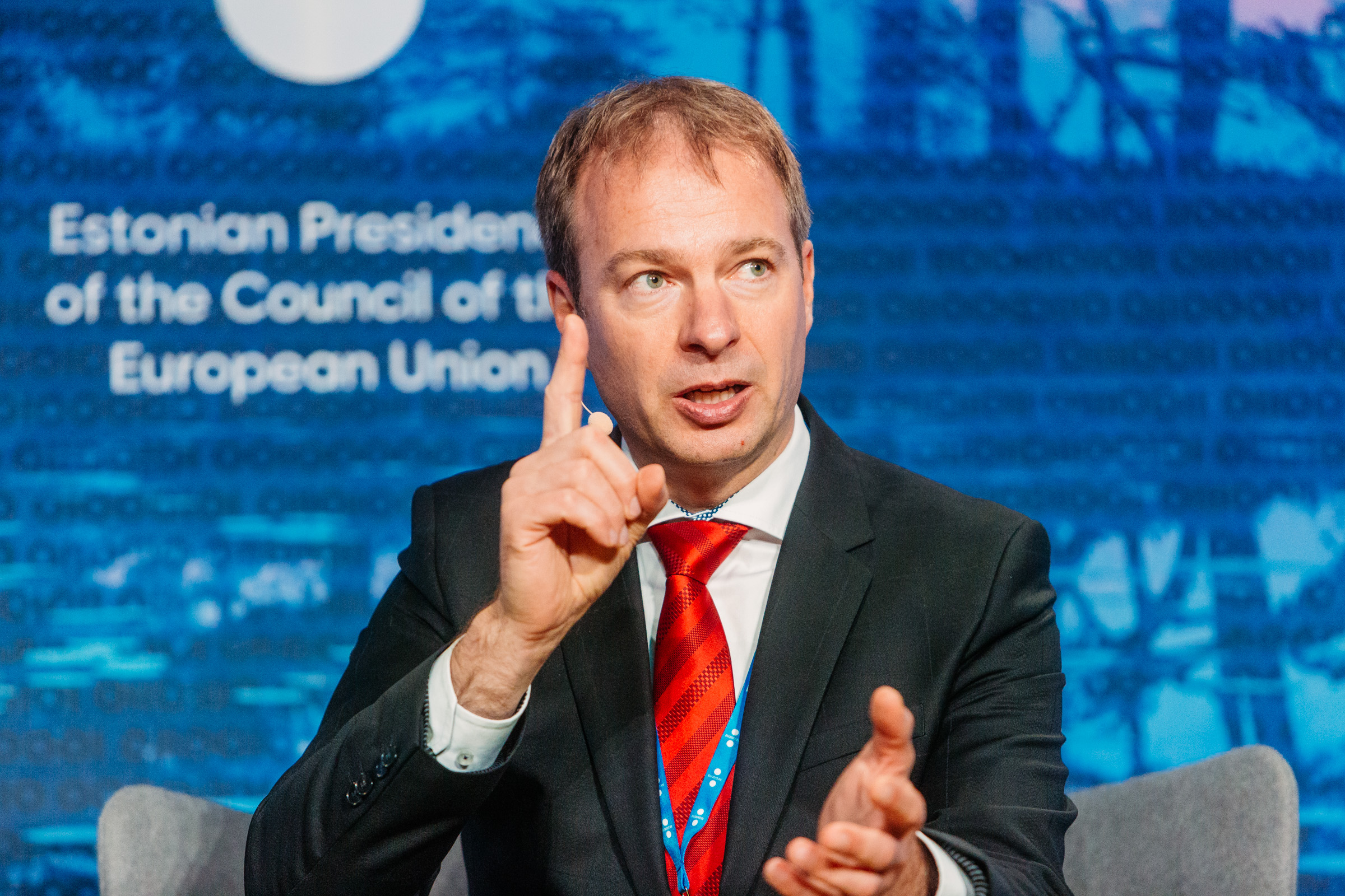 Hando Sutter, CEO, Eesti Energia Photo: Arno Mikkor (EU2017EE)